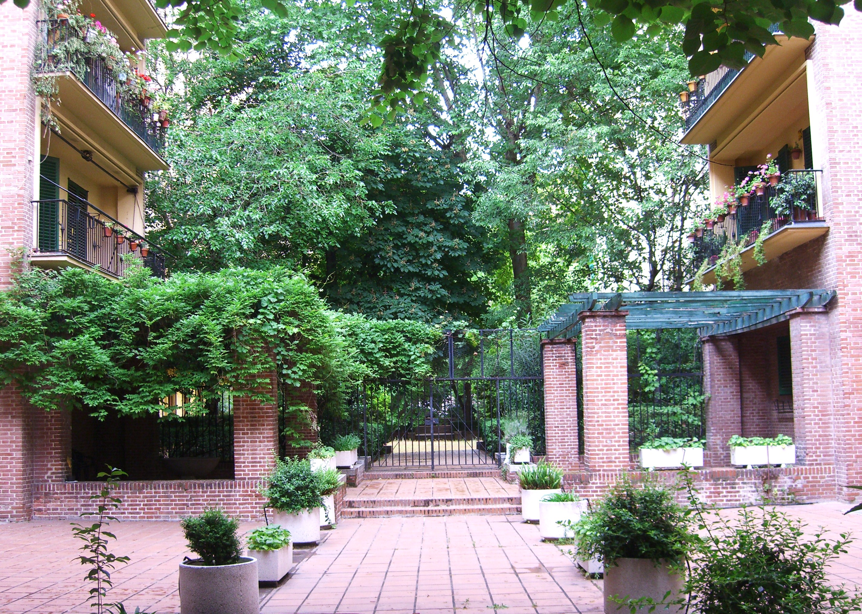 Casa de las Flores („Haus der Blumen“). Gebaut 1930-1932, Argüelles Stadtviertel; Architekt:Secundino Zuazo Ugalde. Hier wohnte der chilenische Dichter Pablo Neruda, als er Konsul in Madrid war. Das Haus wurde 1939 zerstört und nach dem Bürgerkrieg wiedergebaut.